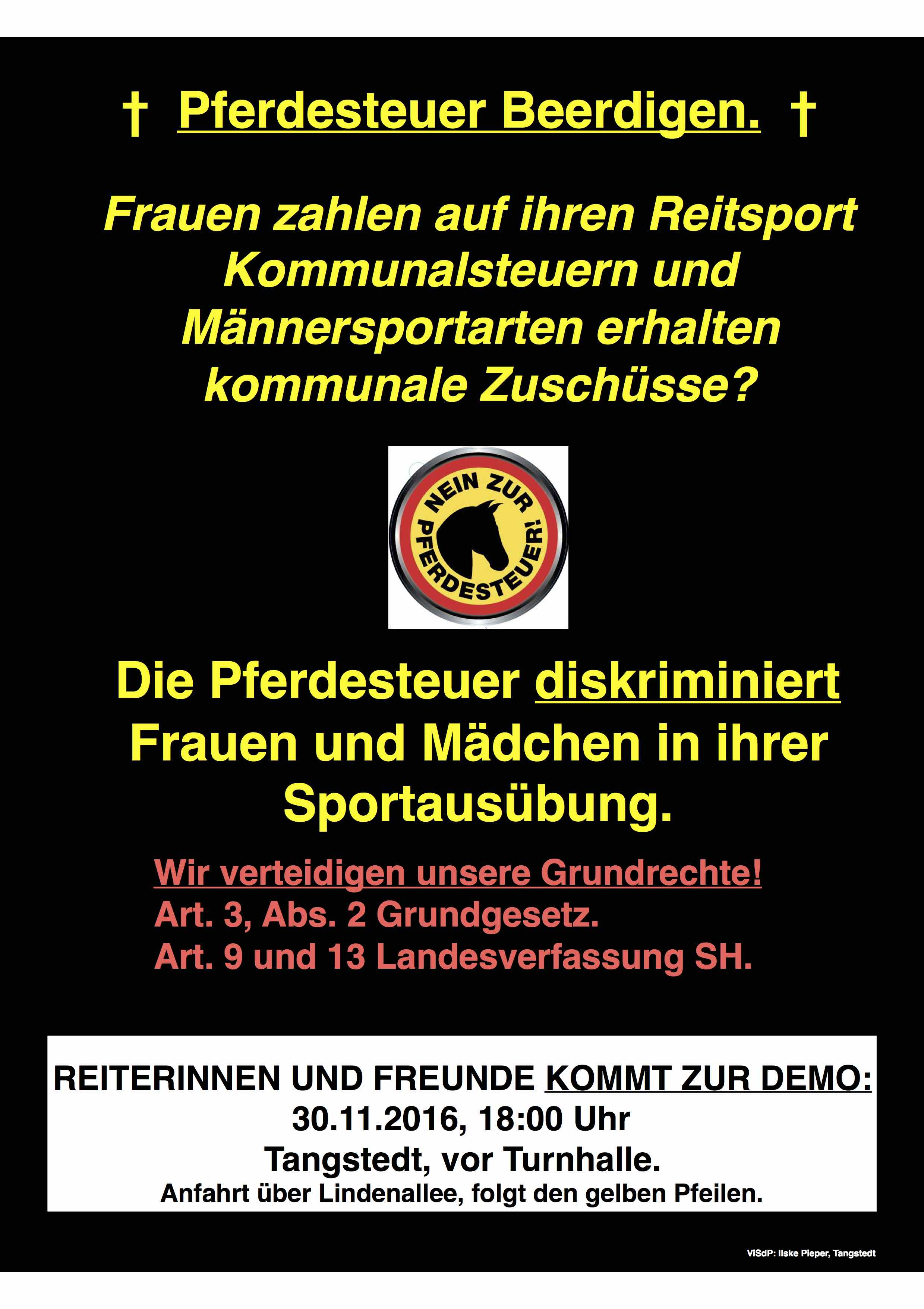 Plakat "Die Pferdesteuer diskriminiert Frauen und Mädchen in ihrer Sportausübung"